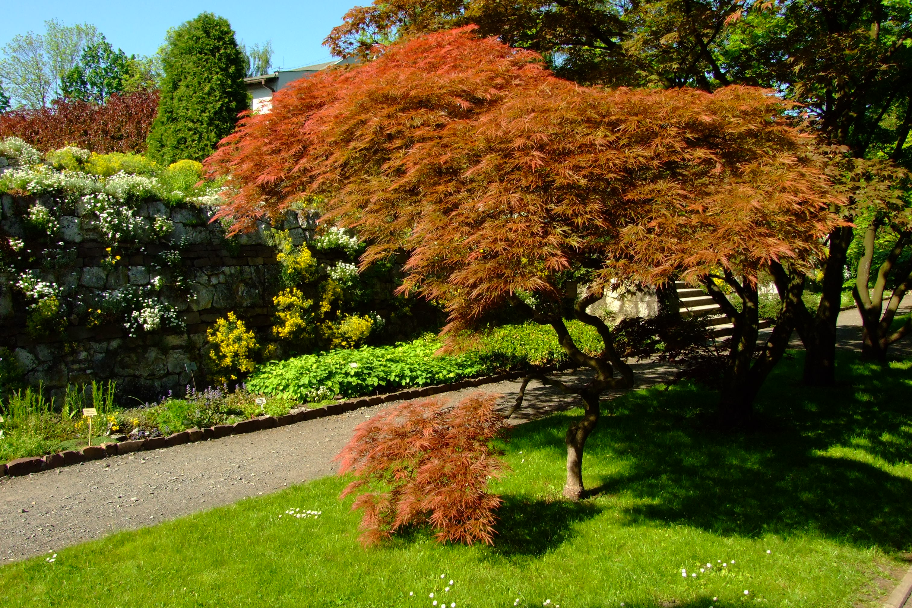 Kraków, ul. Kopernika 27 - Ogród Botaniczny Uniwersytetu Jagiellońskiego